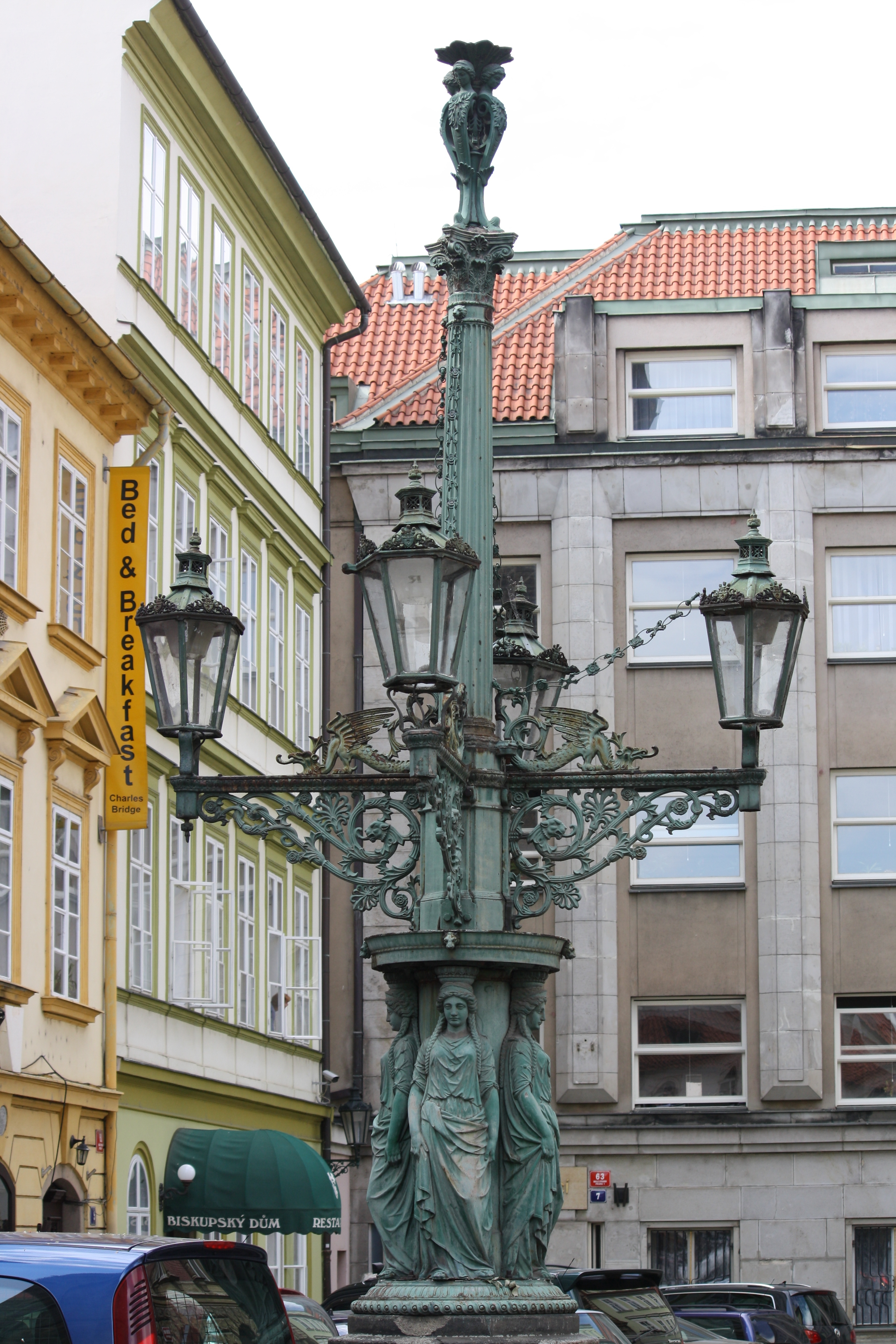 Praha, Malá Strana - Dražického náměstí, kandelábr